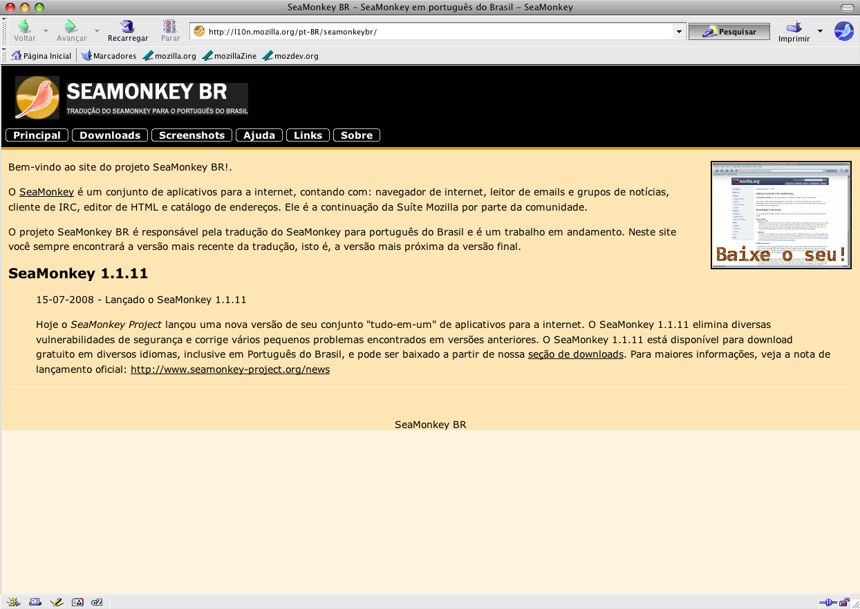 Navegador SeaMonkey 1.1.11 em português.